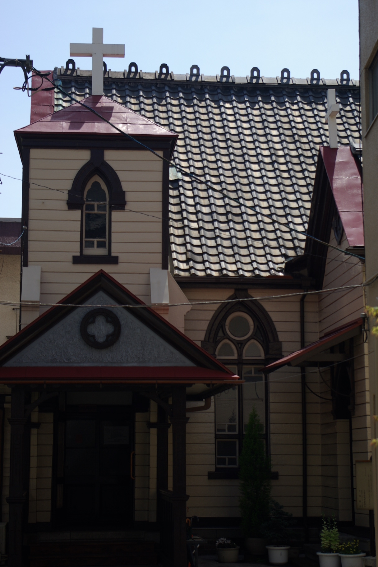 日本キリスト教団 千葉教会